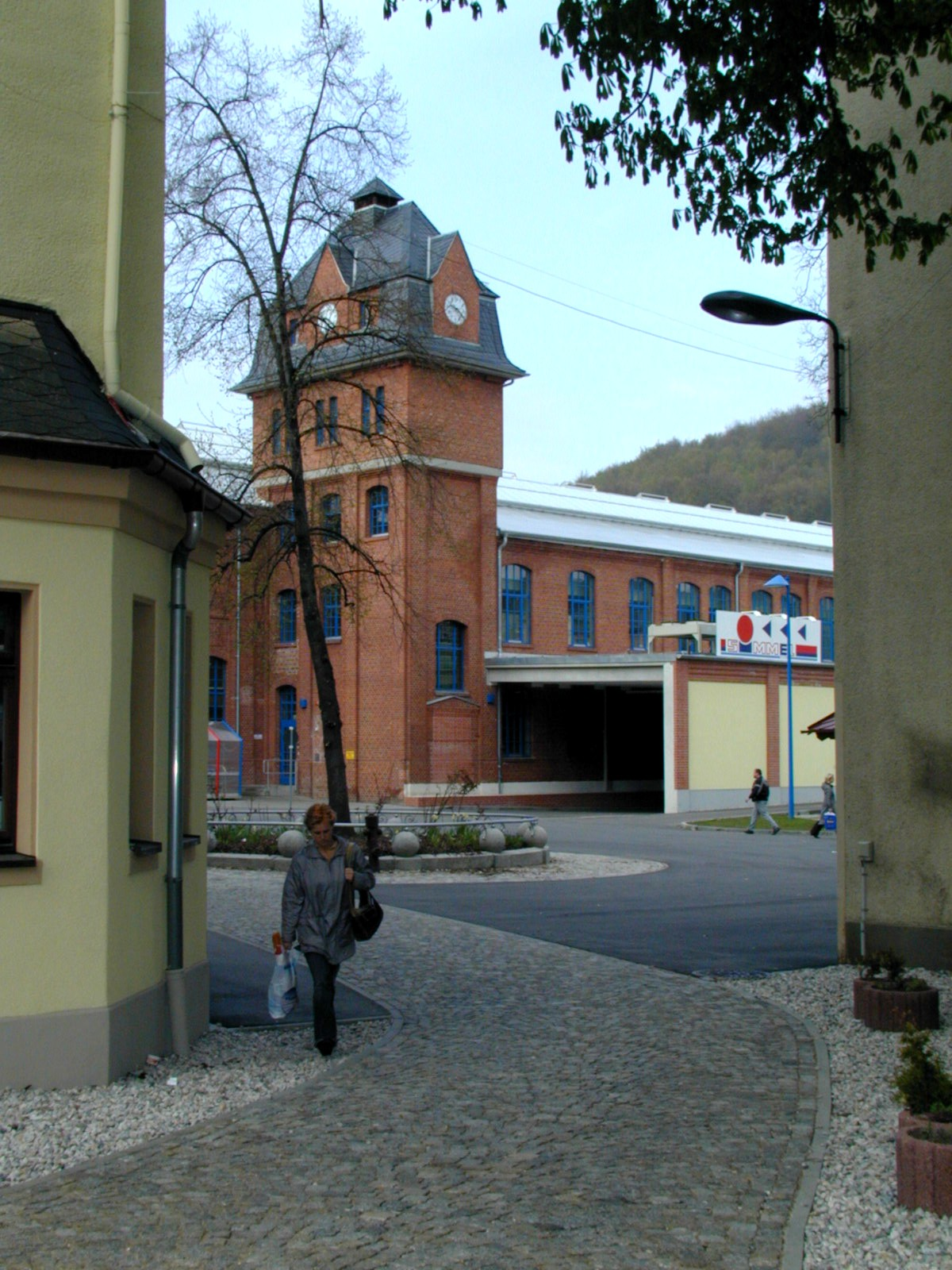 als Einkaufszentrum umgebaute ehemalige Fabrik TEXTIMA